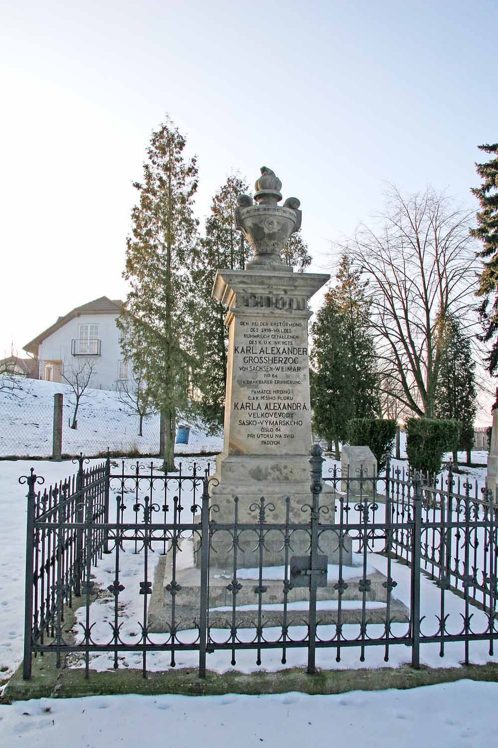 Pomník z Prusko-rakouské války roku 1866